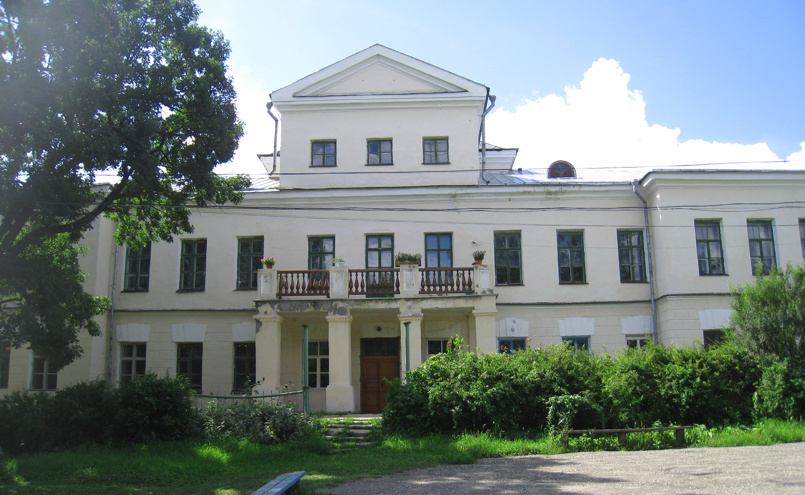 Усадьба Голицыных (усадьба князя Голицына): Сима, Юрьев-Польский район, Владимирская область